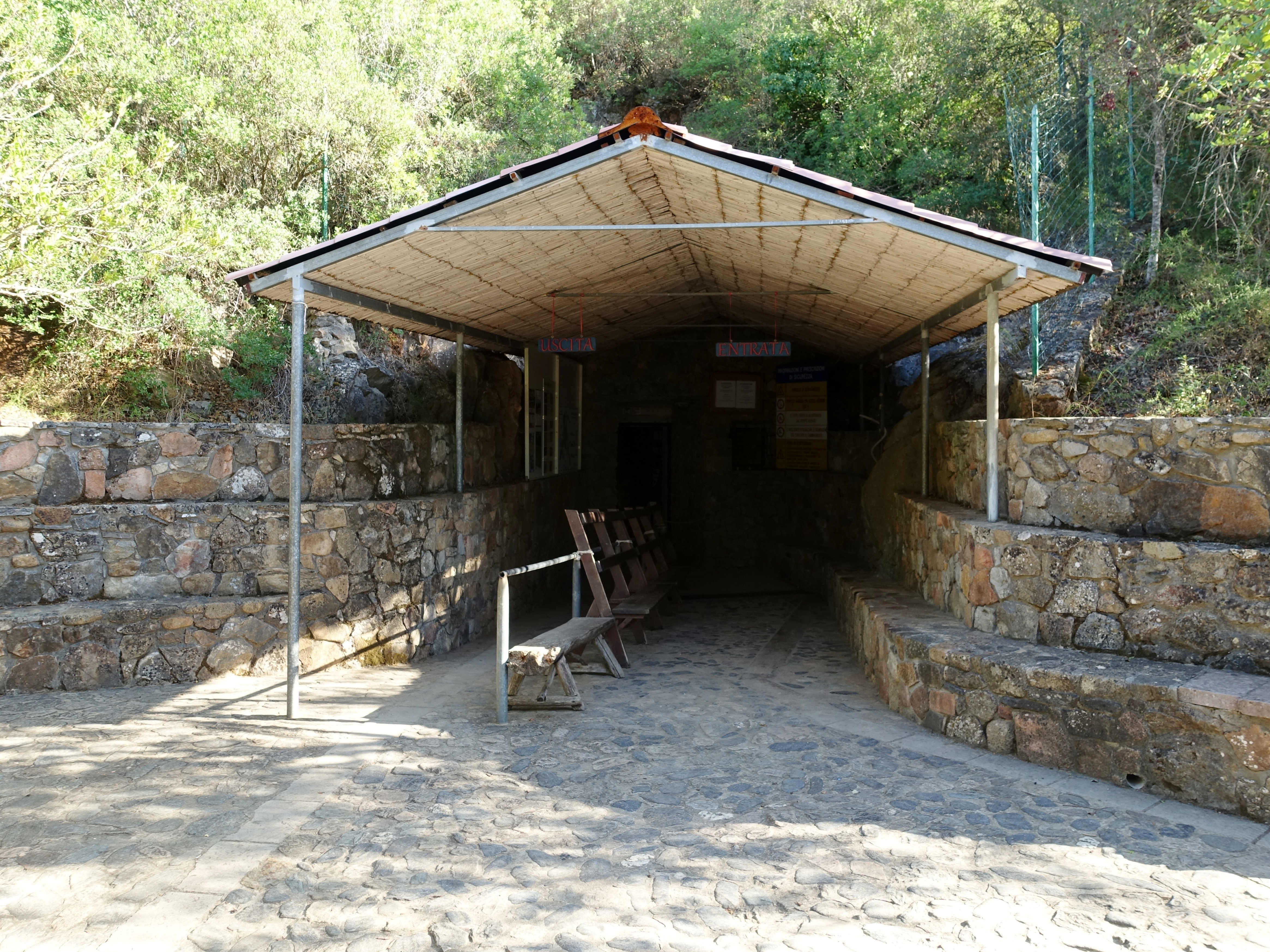 Eingang zur Grotte Is Zuddas, Gemeinde Santadi, Sardinien, Italien